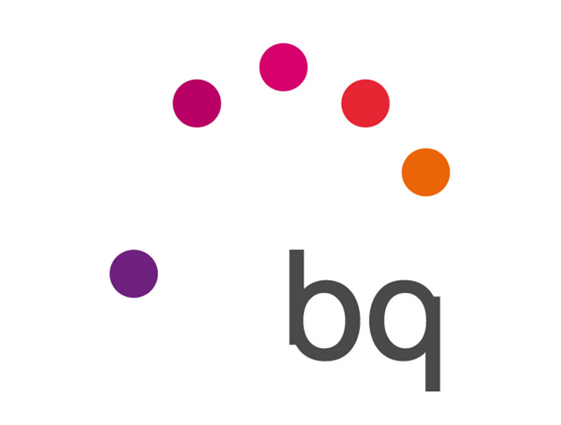 Logo de BQ